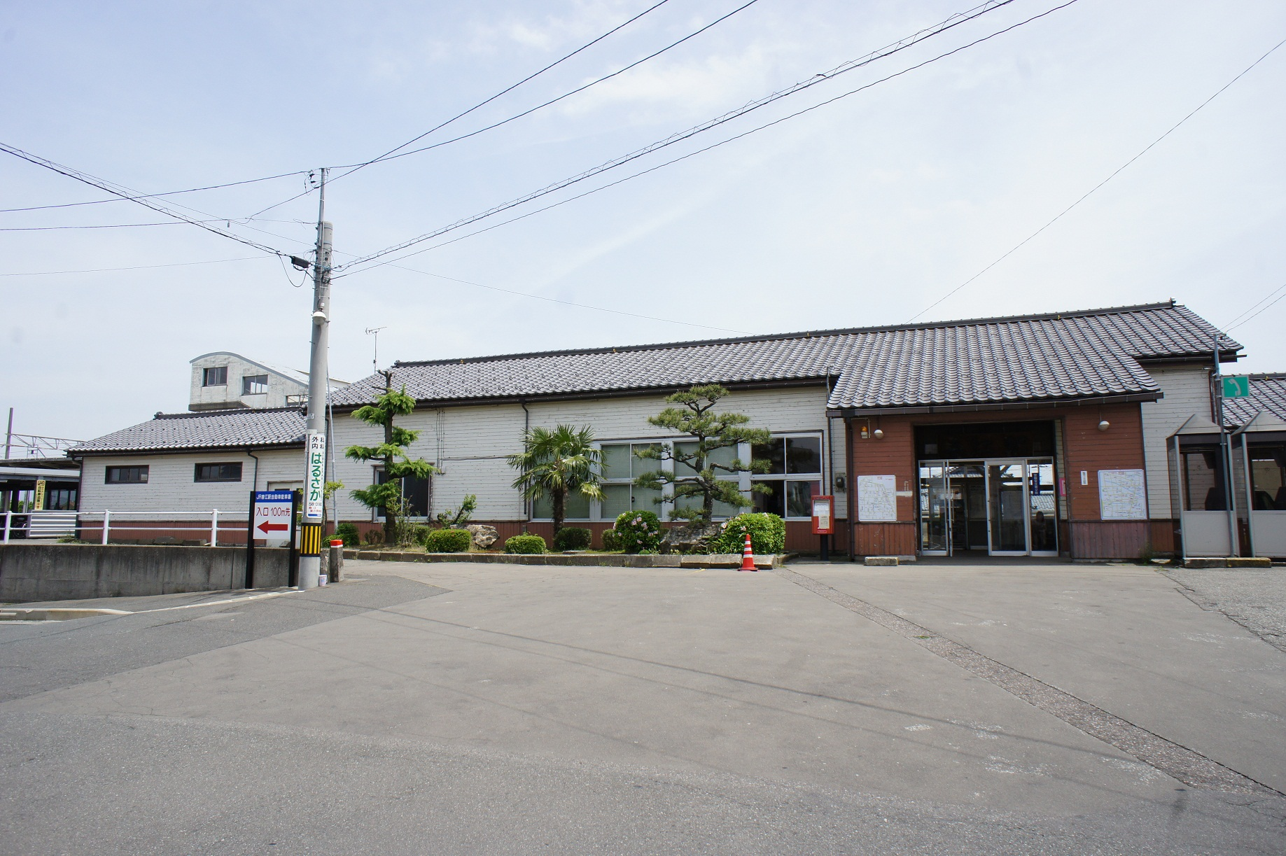 JR春江駅